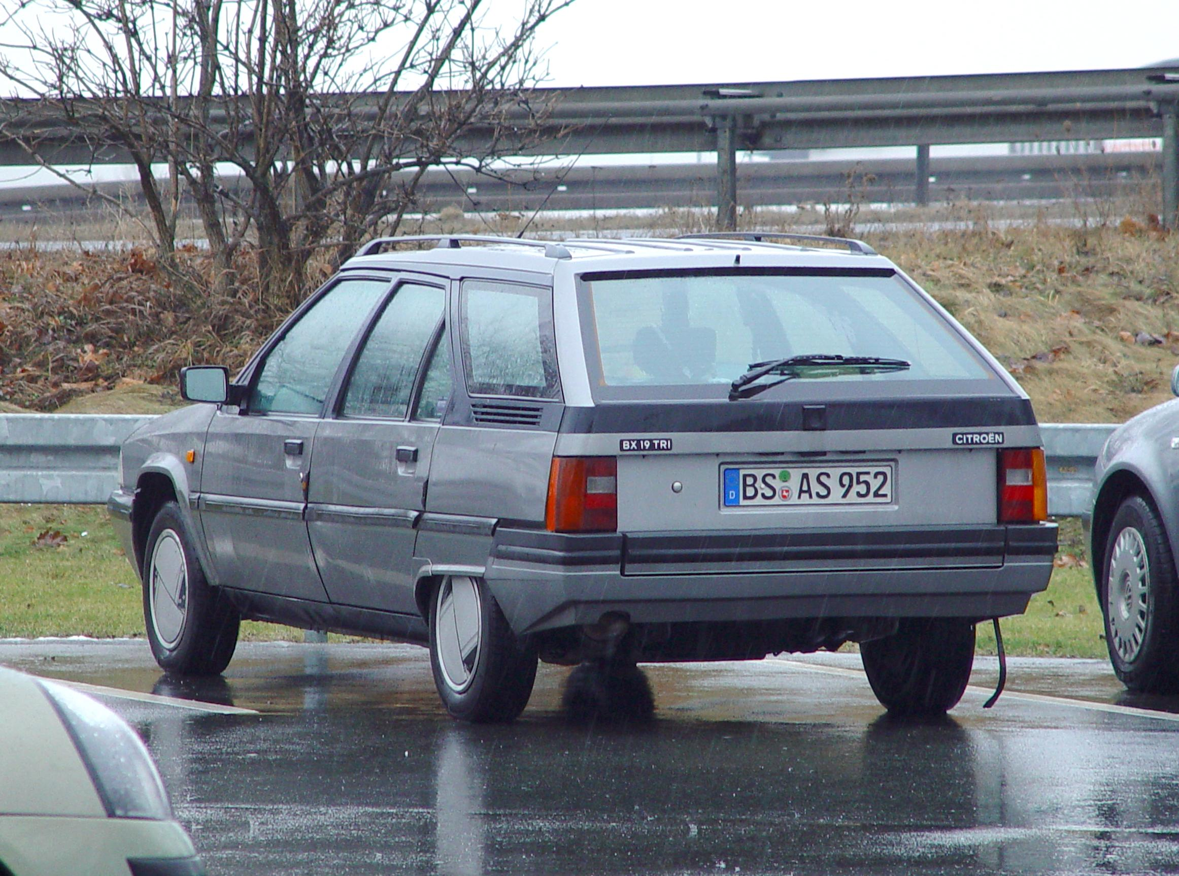 Beschreibung: Citroën BX19 TRI, Baujahr 1991 Aufnahmedatum: 10. Februar 2005 nachdem das Auto 4 mal um die Erde fuhr Fotograf: ArtMechanic